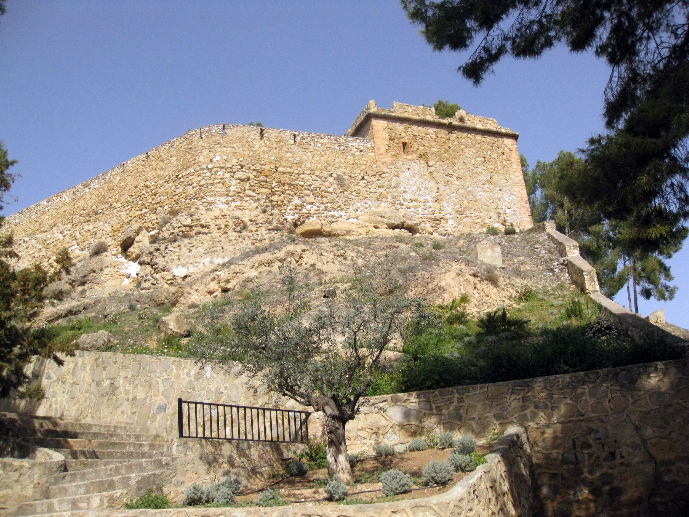 Castell_de_La_Estrella_(Sogorb),_bastió_sud-est